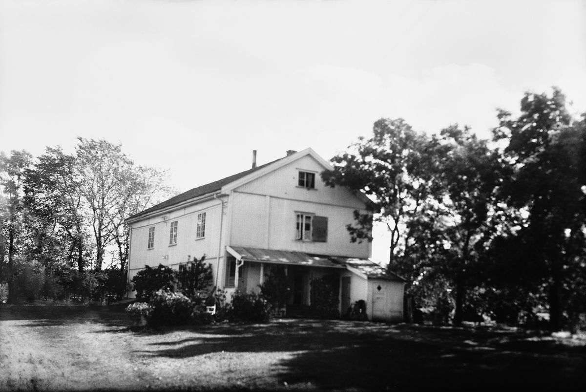 Ekeberg gård (gnr 151) også omtalt som Store Ekeberg, Stamhuset Ekeberg og Ekeberg hovedgård er en av urgårdene i Oslo-området.